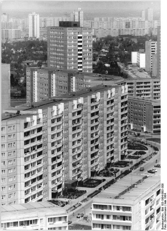 ADN-ZB-Zimmermann-1.6.84-Berlin: Berlin-Marzahn-Blick über das Wohnviertel am Murtzahner Ring im II. Wohngebiet auf das III. Wohngebiet. Dazwischen befinden sich die erhalten gebliebenen Siedlungshäuser südlich der Leninallee. Heute leben in diesem inzwischen größten Neubaugebiet der DDR rund 110 000 Menschen in mehr als 43.000 gut ausgestatteten Wohnungen. In diesem Jahr kommen 6.390 Wohnungen dazu. n